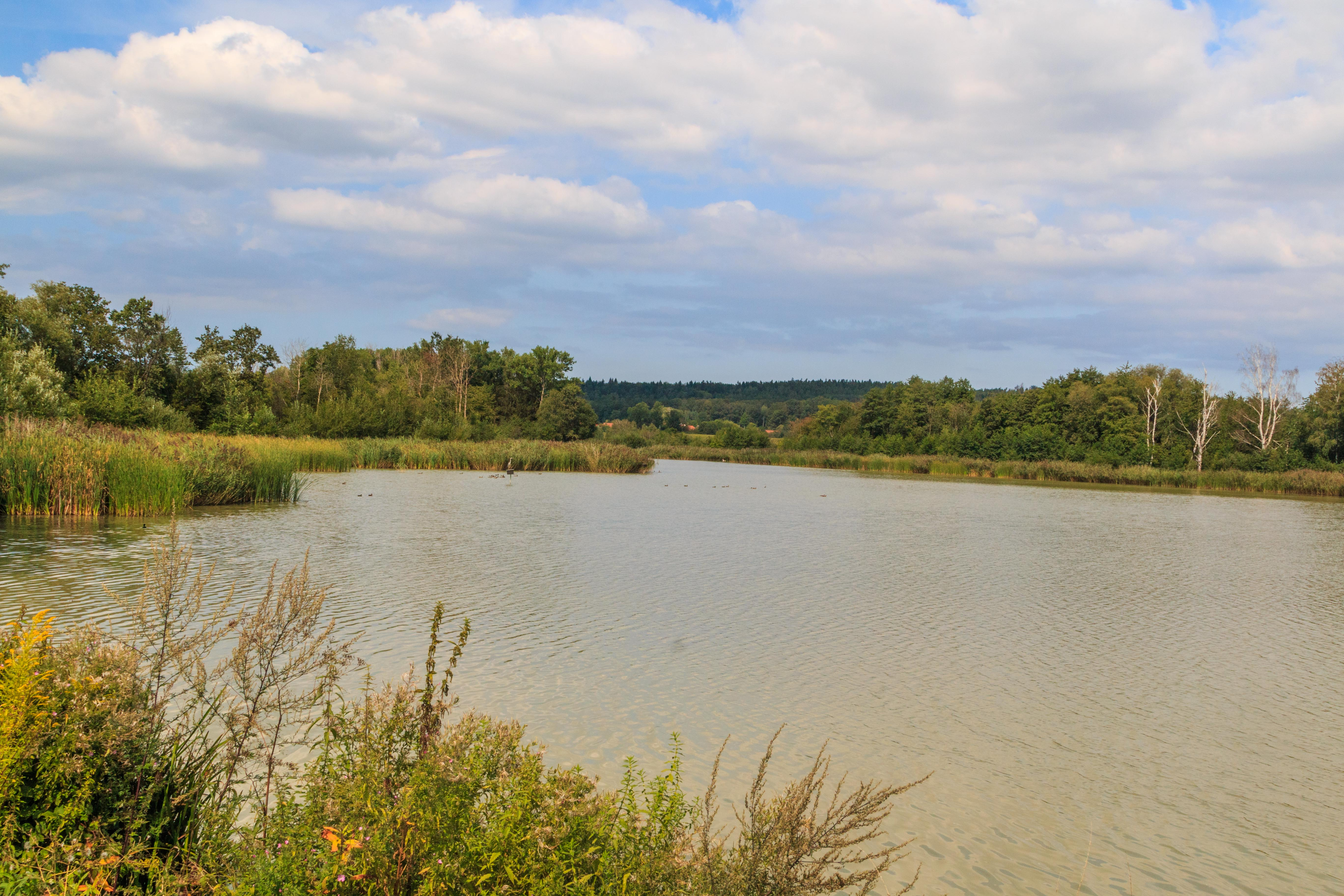 Podedvorní rybník